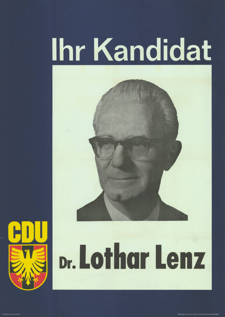 Ihr Kandidat CDU Dr. Lothar Lenz Abbildung: Porträtfoto Plakatart: Kandidaten-/Personenplakat mit Porträt Auftraggeber: CDU Niedersachsen, Hannover Drucker_Druckart_Druckort: Repro-Druck, Schmiden bei Stuttgart Objekt-Signatur: 10-008 : 216 Bestand: Landtagswahlplakate Niedersachsen (10-008) GliederungBestand10-18: Landtagswahlplakate Niedersachsen (10-008) » CDU Lizenz: KAS/ACDP 10-008 : 216 CC-BY-SA 3.0 DE